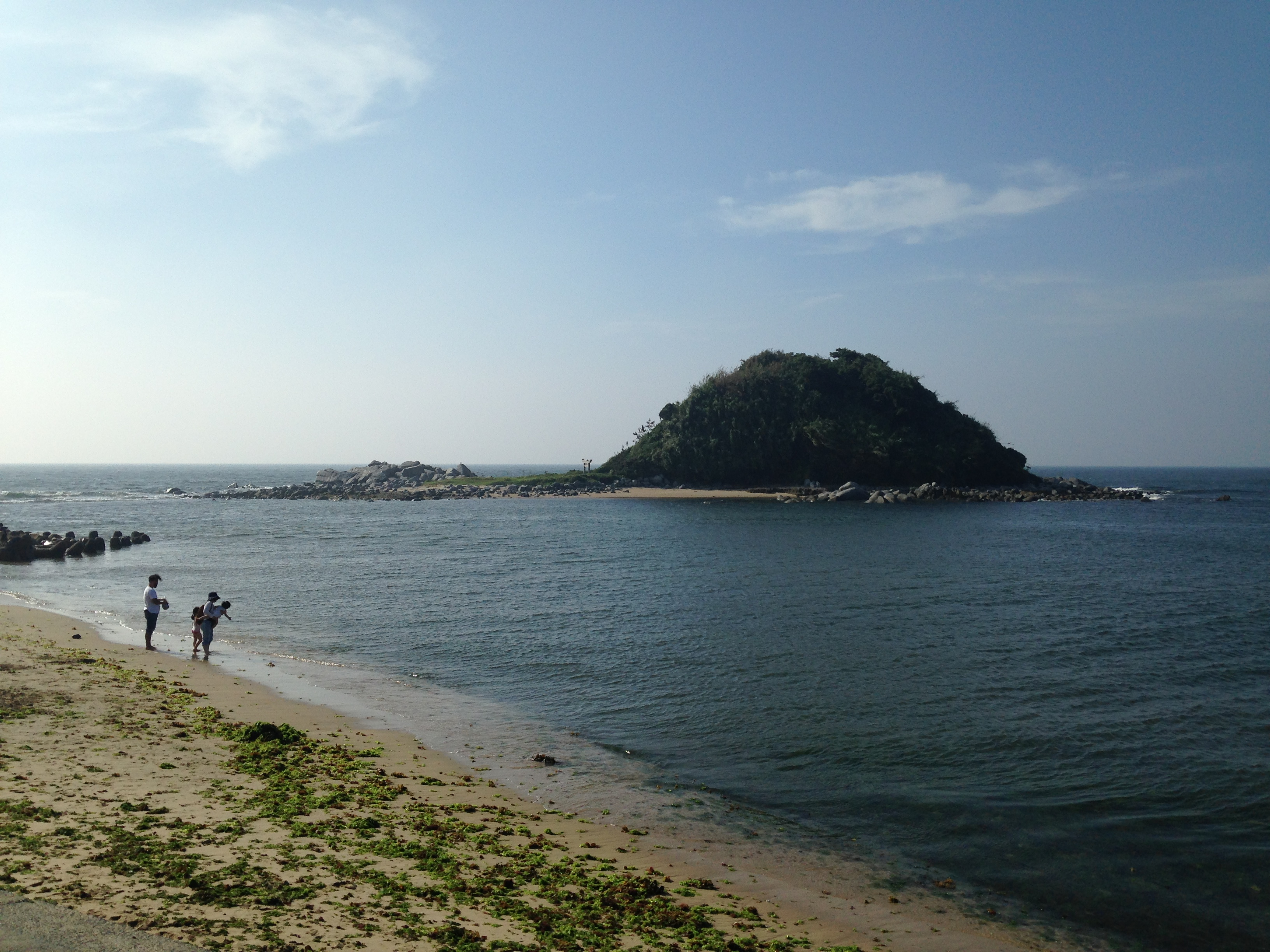 志賀島の下馬ヶ浜海水浴場より望む沖津島。島には志賀海神社の沖津宮がある